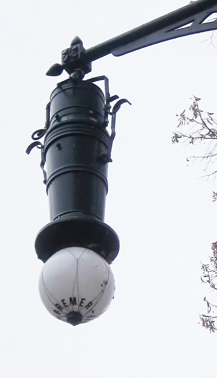 Rekonstruktion der Hugo-Bremer-Leuchte in Arnsberg-Neheim. Das Original befindet sich im Museum München. Die Rekonstruktion entstand unter anderem mit Unterstützung des Museums München.